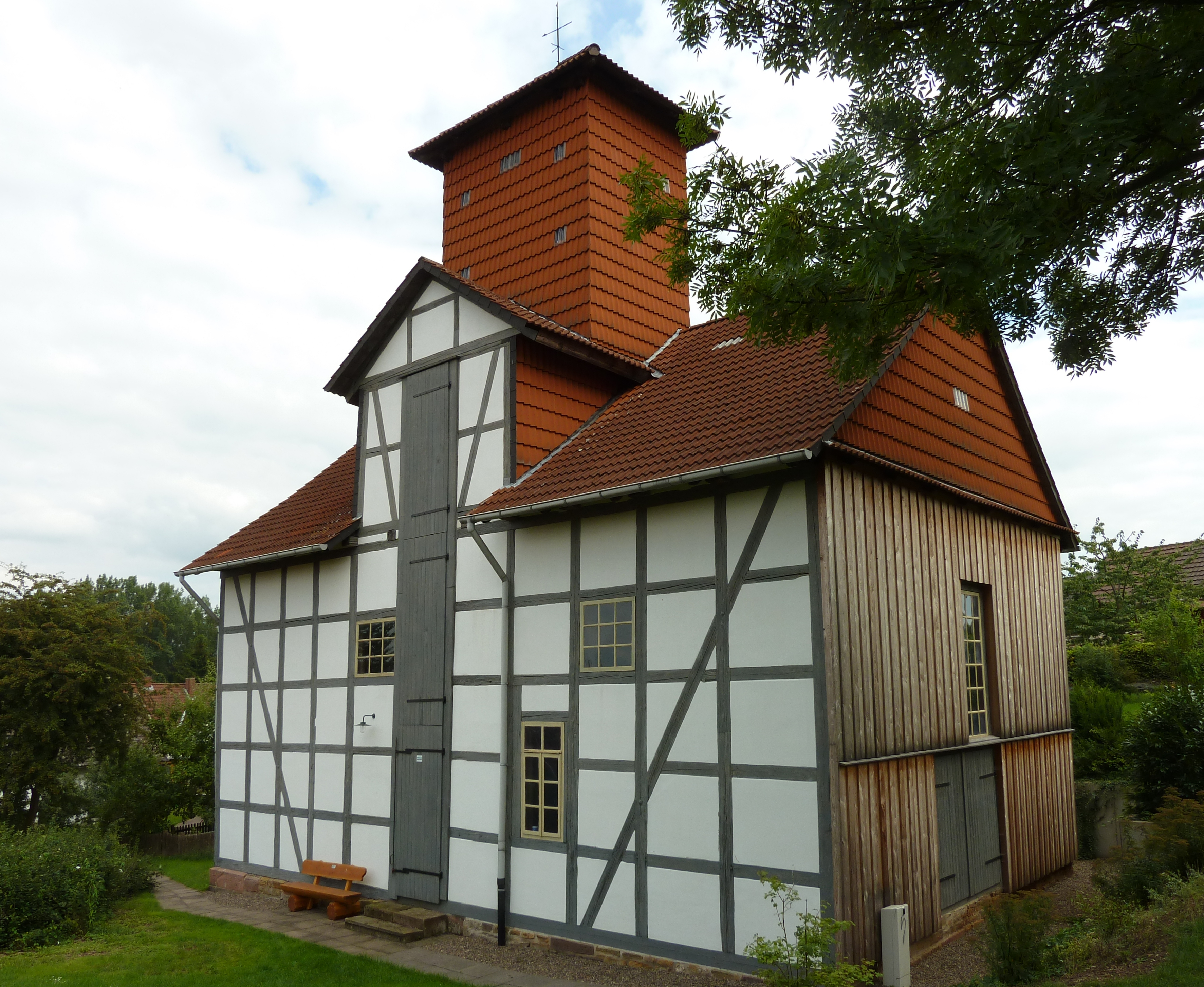 Oberer Bohrturm der Saline Sülbeck, Stadt Einbeck. Erbaut 1865, seit 1994 vom Heimatverein Leinetal e.V. gepachtet und als Meseum betrieben, 2006 saniert